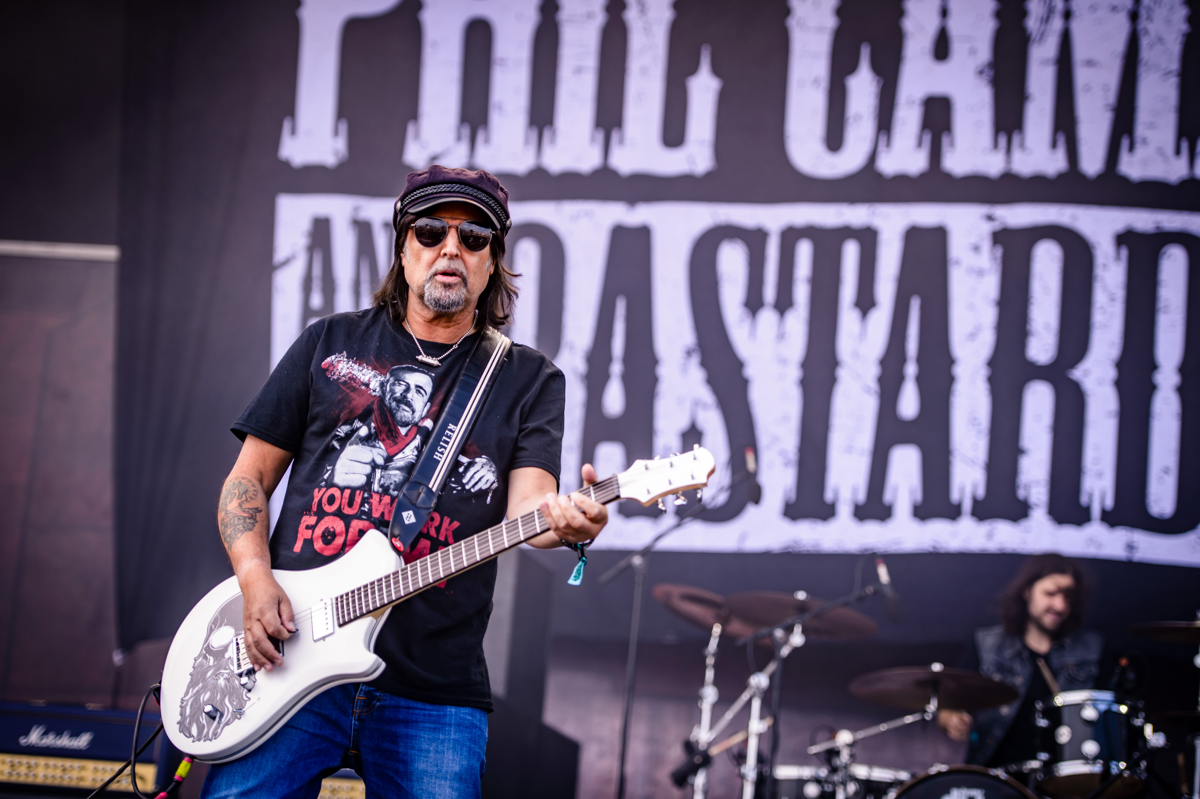 'Summer Breeze Festival 2018; Dinkelsbühl': 'Phil Campbell and the Bastard Sons'